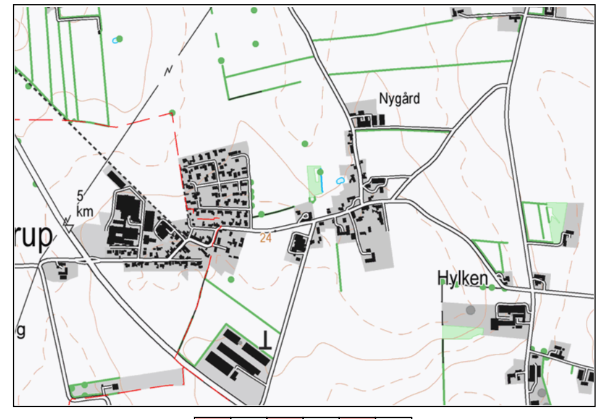 Bovlstrup omkring 1980